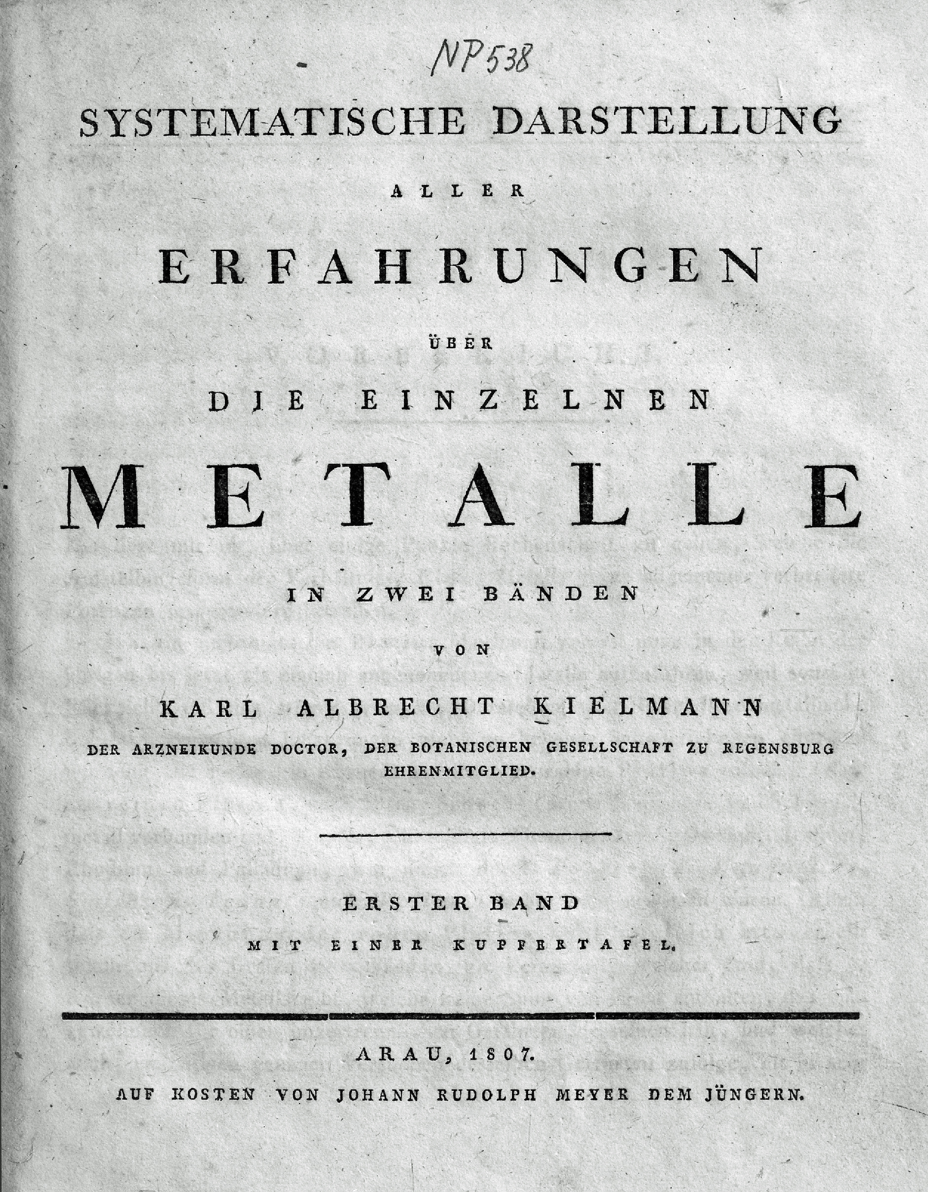 Johann Rudolf Meyer (Hrsg.): Systematische Darstellung aller Erfahrungen in der Naturlehre. 3. Teil (Karl Albrecht Kielmann: Metalle), 1. Band, Aarau 1807, mehr nicht erschienen.